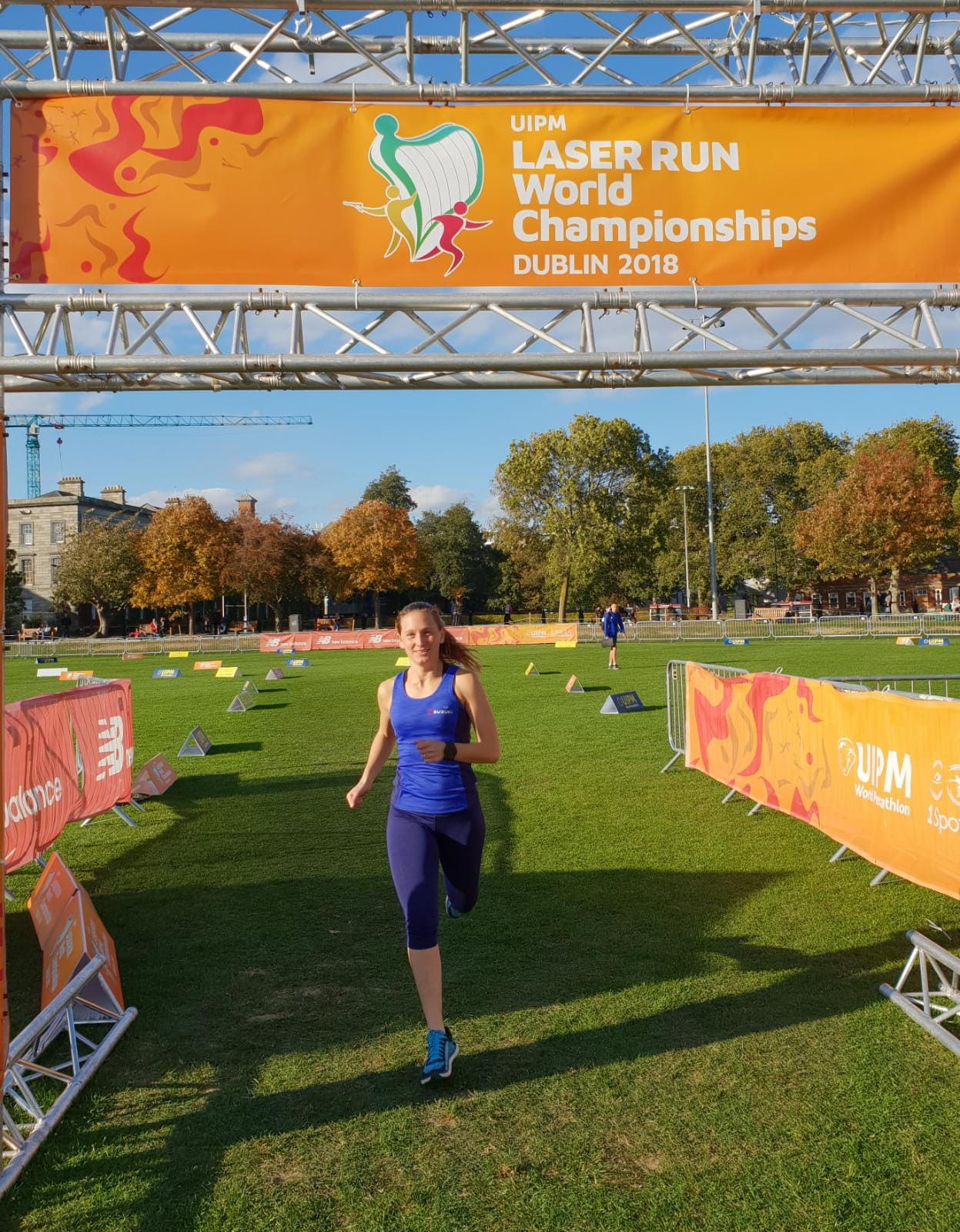 מתוך אליפות העולם בלייזר ראן בדבלין 2018